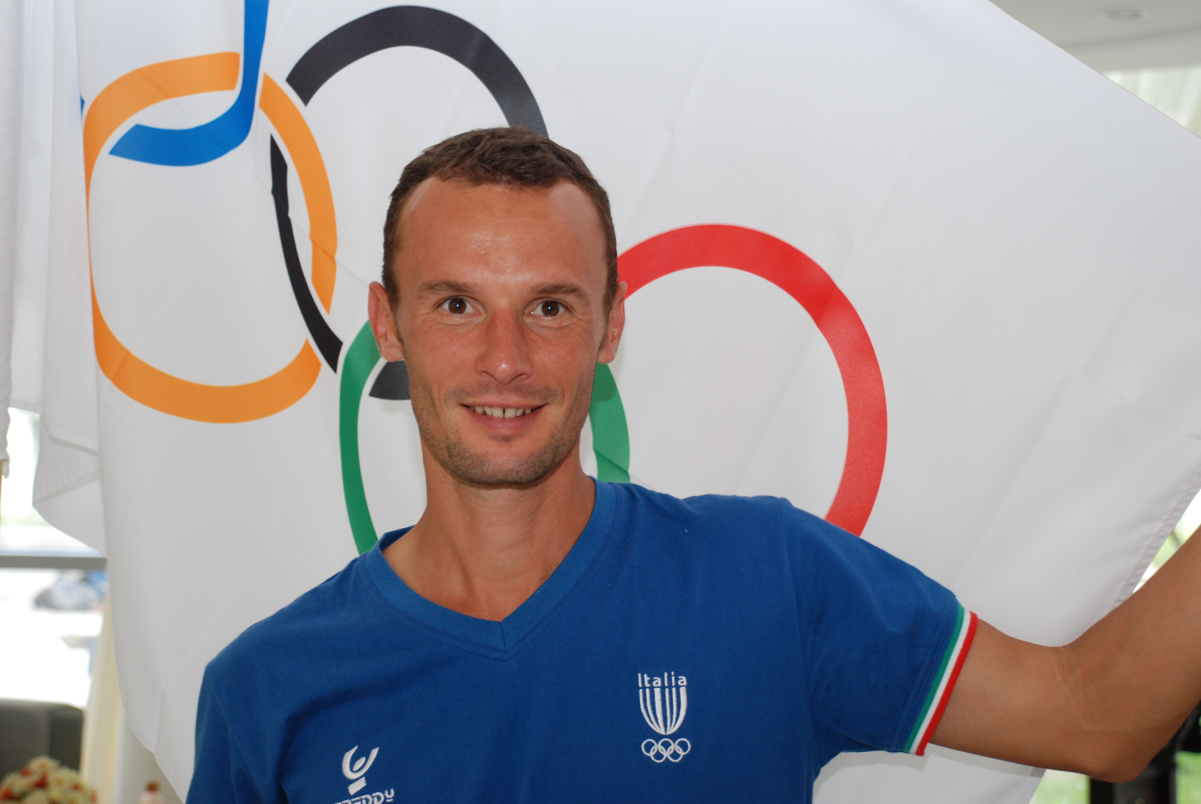 OLIPIADI di Pechino